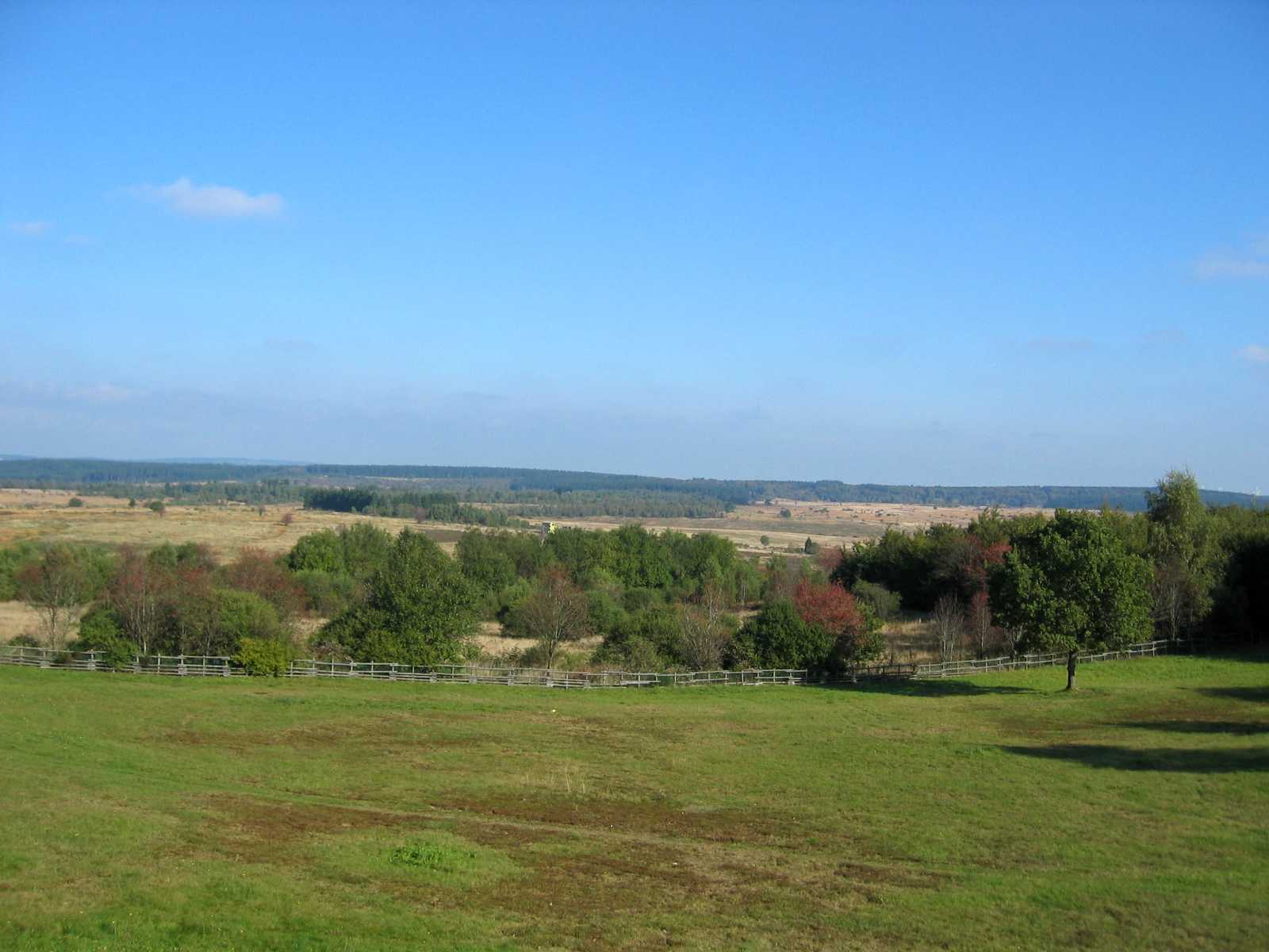 Blick von Elsenborn auf den Übungsplatz